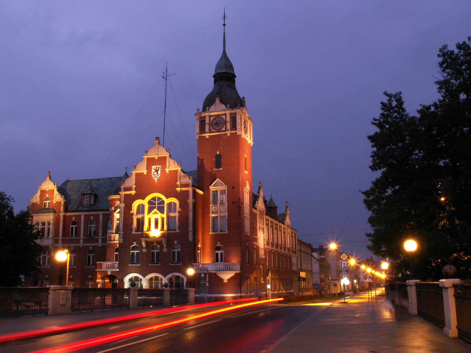 Starostwo w Słupsku